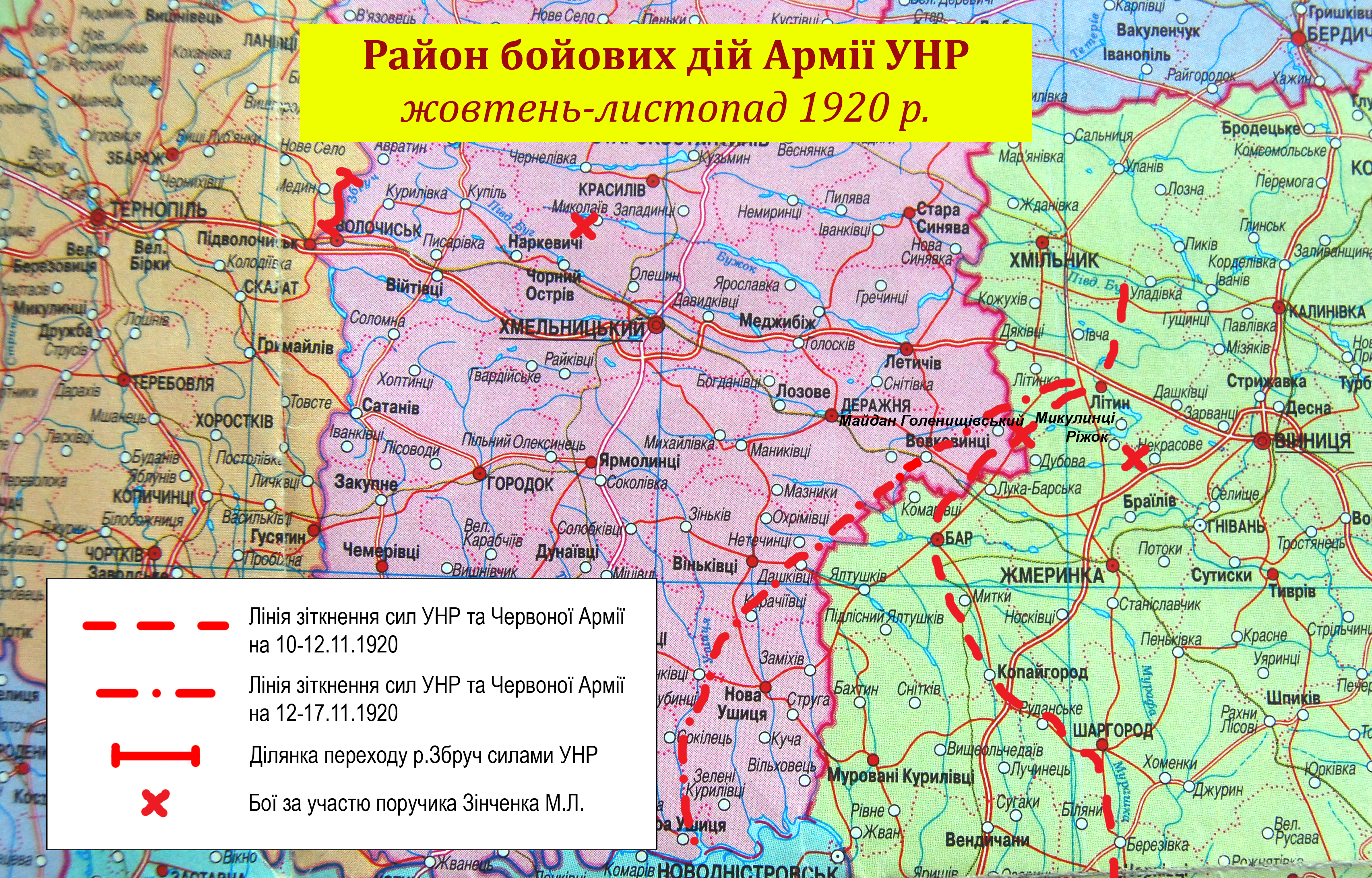 місця боїв Армії УНР восени 1920 р. за участі поручика Зінченка М.Л.